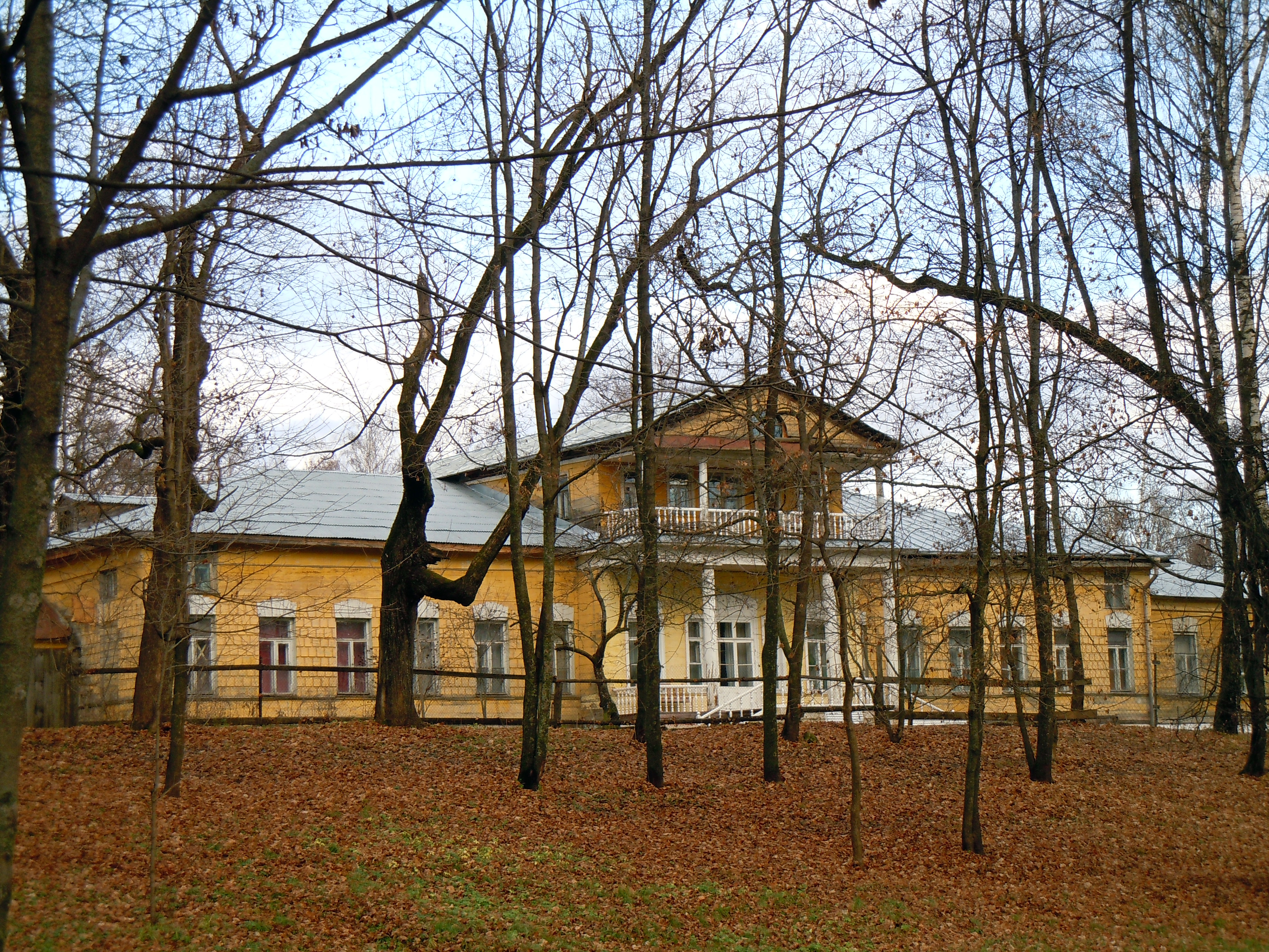 Главный дом с (двумя) деревянными флигелями (и галереями) (Москва и Московская область, посёлок Фряново)